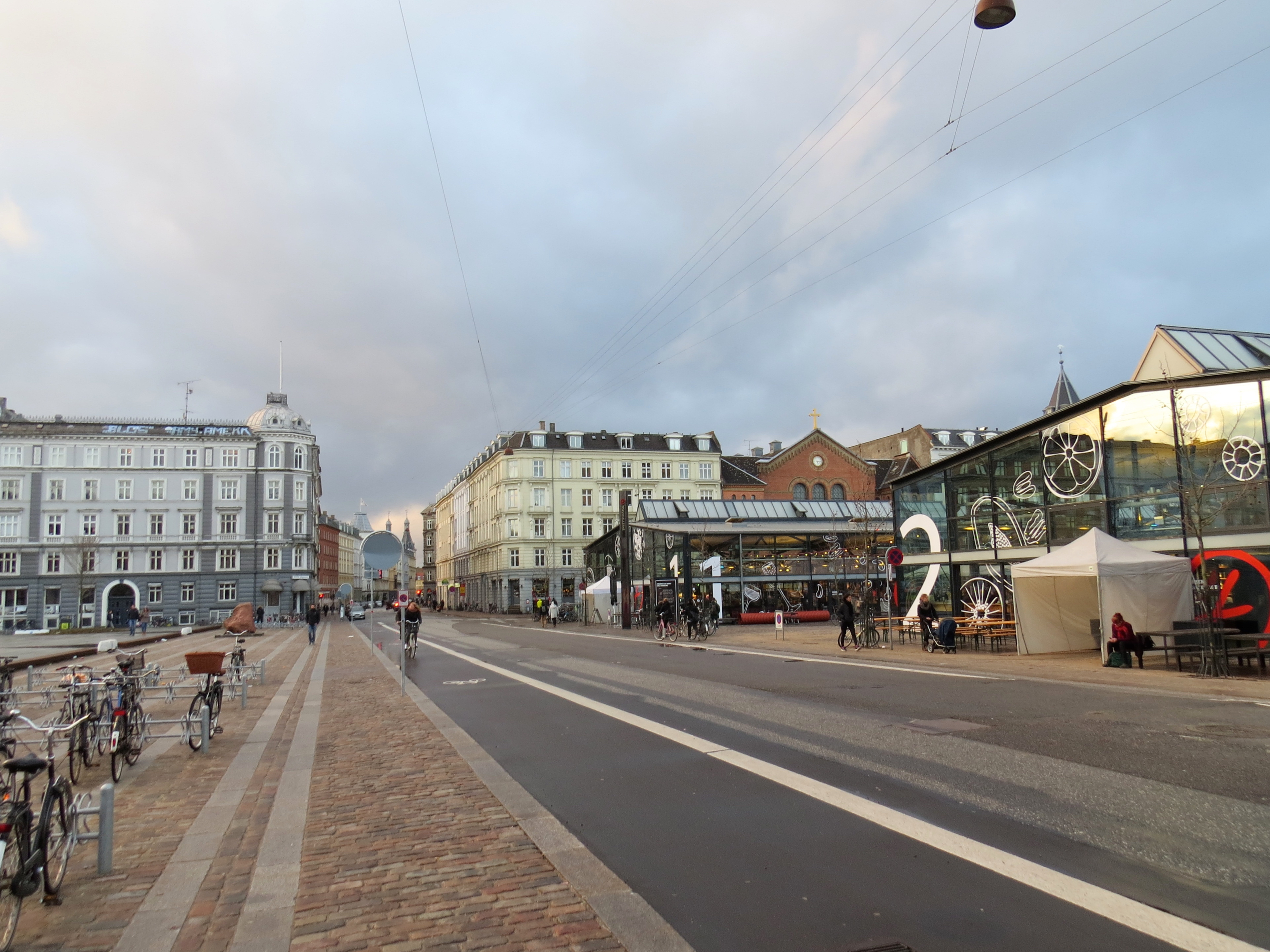 Vendersgade i København med Torvehallerne til højre